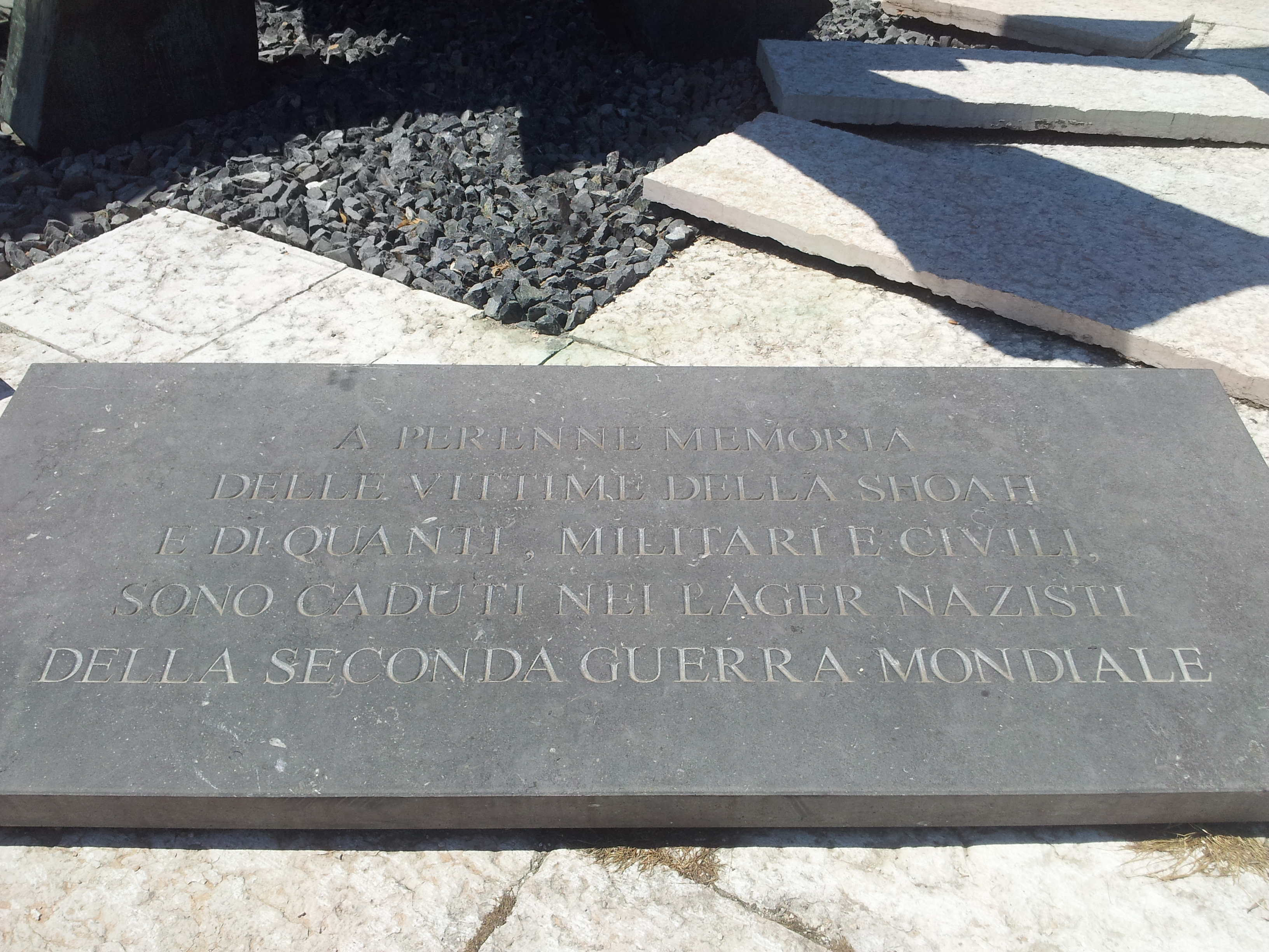 Dettaglio della targa commemorativa alle vittime della Shoah ai piedi della scultura.